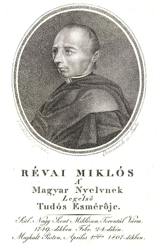 Révai Mátyás Miklós János (Német-Nagy-Szent-Miklós, 1750. február 24. – Pest, 1807. április 1.) nyelvész, egyetemi tanár, a magyar történeti nyelvészet megalapítója. Máig élő helyesírási alapelvünket, a szóelemző elvet képviselte. Új nyelvészeti szakszavakat is alkotott, így például a helyesírás és a nyelvtudós szavunkat.